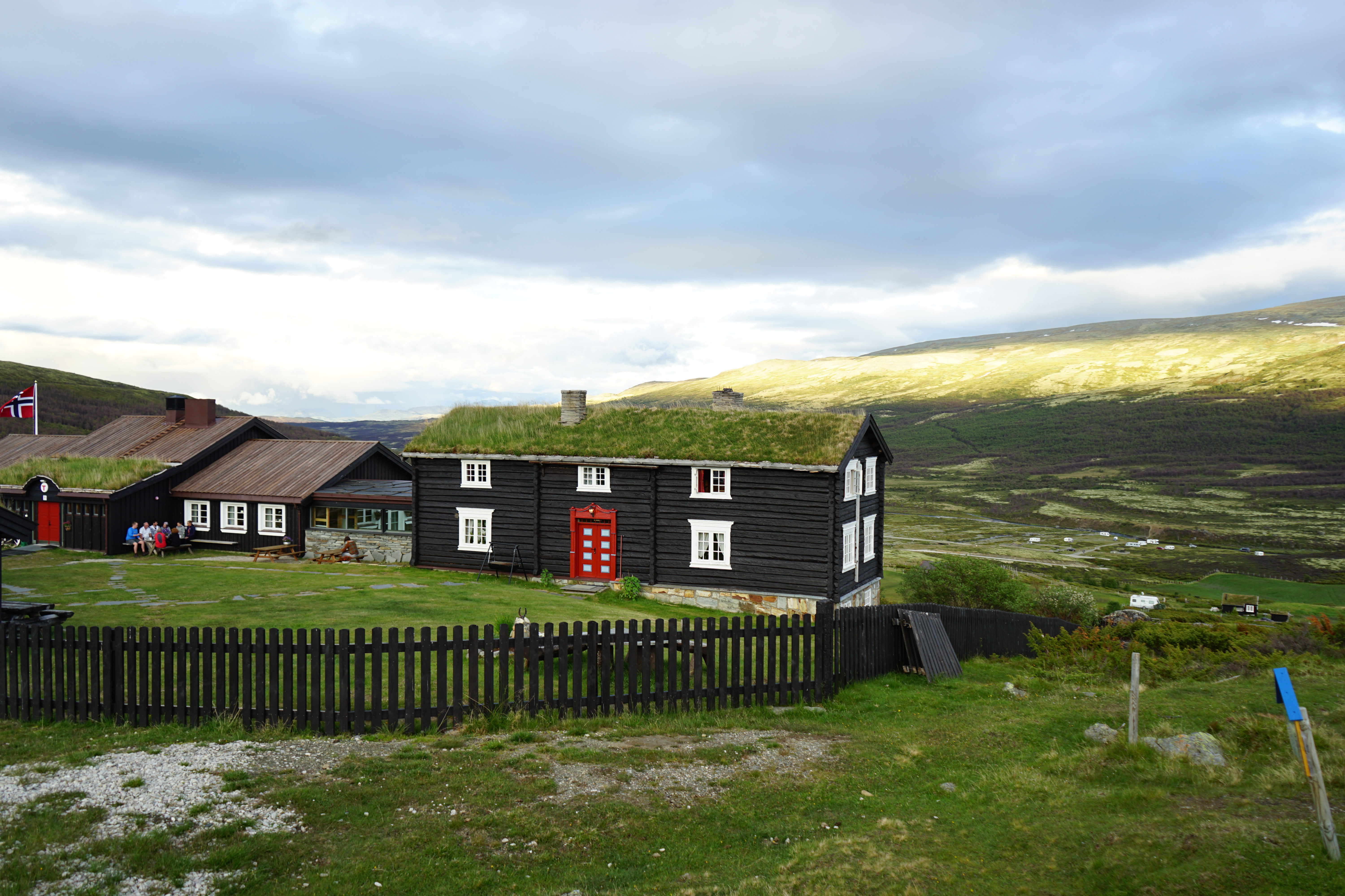 Bilde av Grimsdalshytta